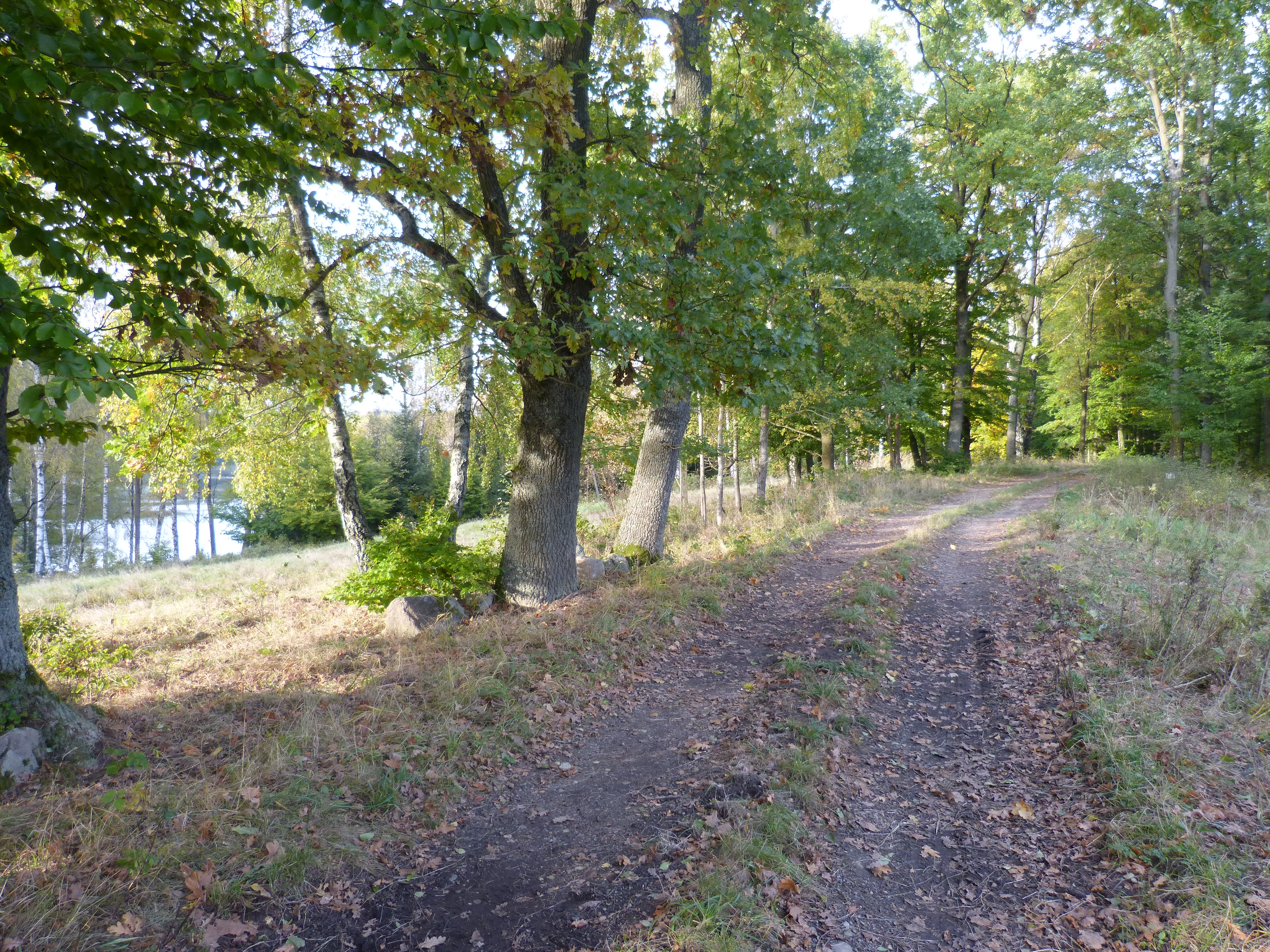 Popielewo - pozostałości średniowiecznego zamku